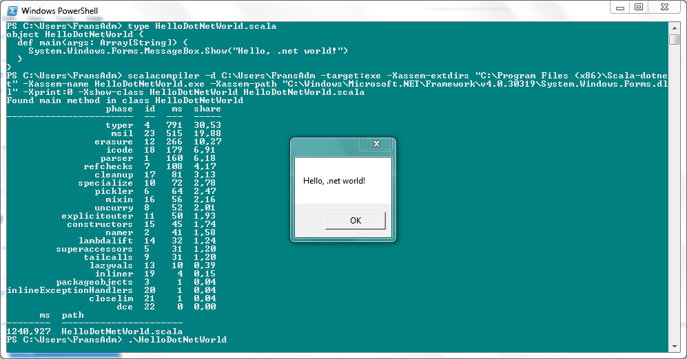 Scala dotNet HelloWorld